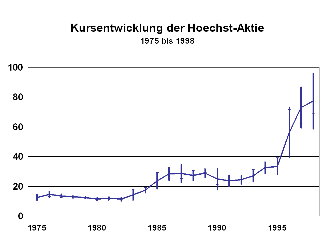 Kursentwicklung der Hoechst-Aktie von 1875 bis 1998. Pro Geschäftsjahr sind der Höchst-, Tiefst- und Schlußkurs in DM je Aktie angegeben, die Mittelkurse als durchgezogene Linie. Achtung: Die Darstellung ist auf Stückaktien bzw. Nennwert 5,- normiert. Bis 1996 war der Nennwert 50,- je Aktie, d.h. die tatsächlichen Notierungen waren zehnmal so hoch.